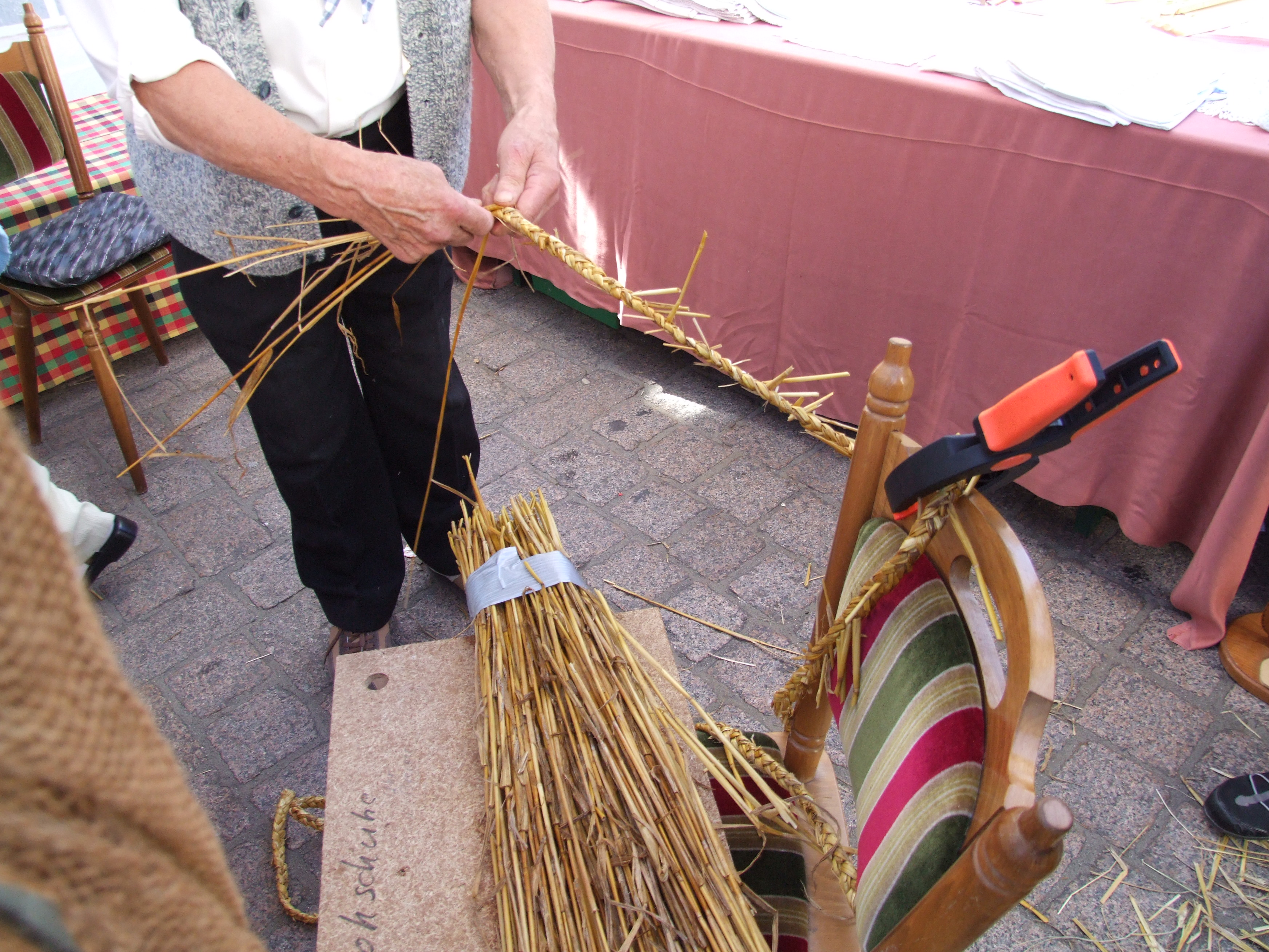 Herstellung eines Seiles aus trockenem Stroh durch Flechten für die Fertigung von Strohschuhen, durch einen Handwerker aus dem Hunsrück auf dem Bauernmarkt Speyer 2007. Dieser gehört zu einer Gruppe von Senioren, die durch Herstellung von Produkten mittels alter Handwerkstechniken und dem Verkauf von Trödel 100.000 Euro für krebskranke Kinder gesammelt/erarbeitet haben. Weil alle Beteiligten über 70 waren, einige über 80 und das Spendenziel erreicht worden war, war Speyer ihr letzter Einsatz.